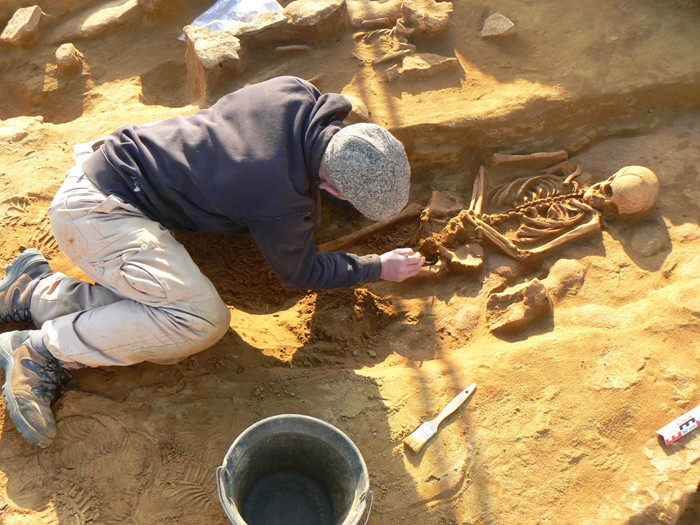 Nécropole Mérovingienne du Brigandin